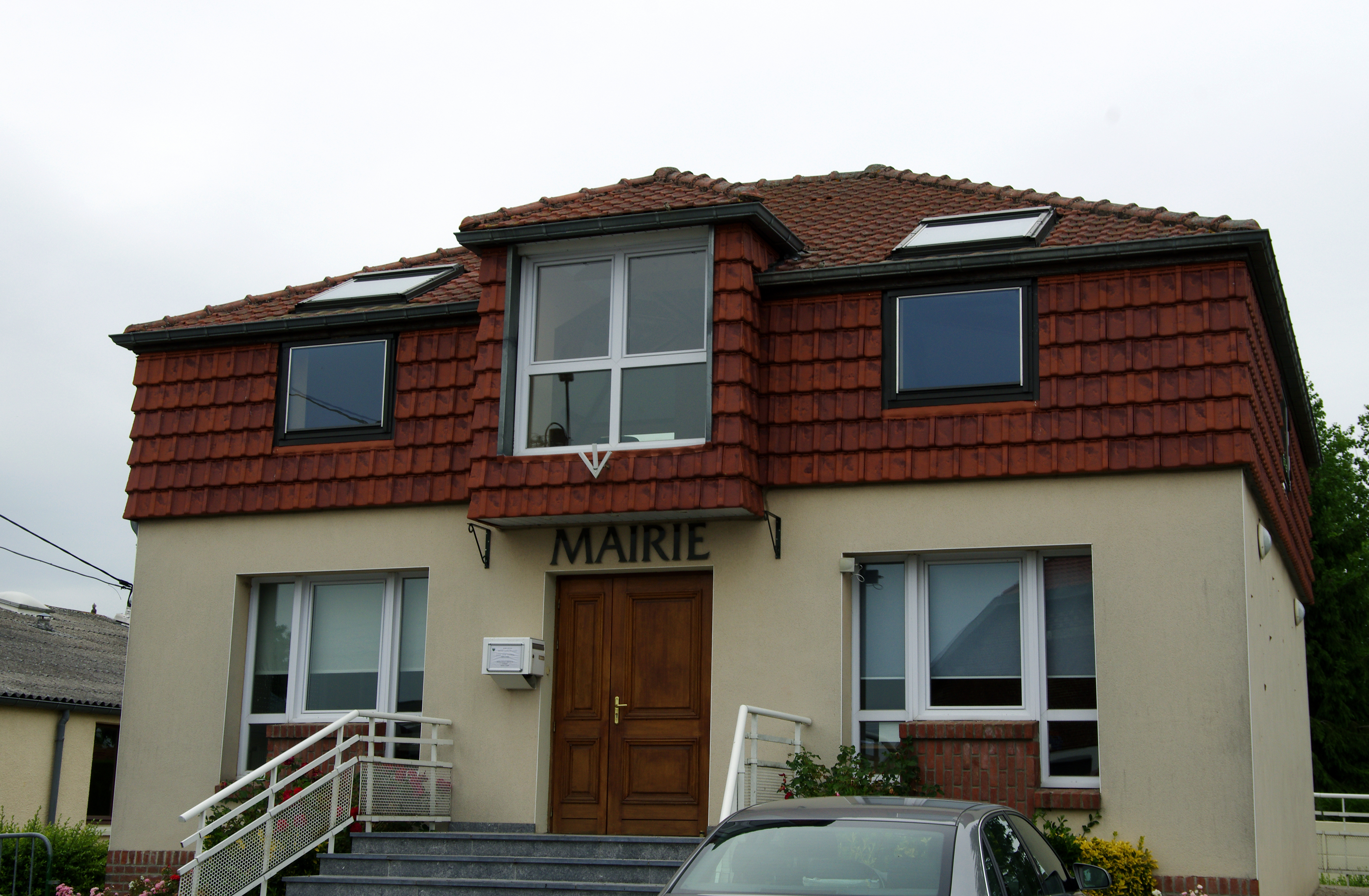 Écurie (Pas-de-Calais, France) - La mairie. .